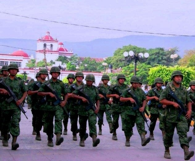 Desfile civico-militar del 150 aniversario de la batalla del 21 de Octubre.